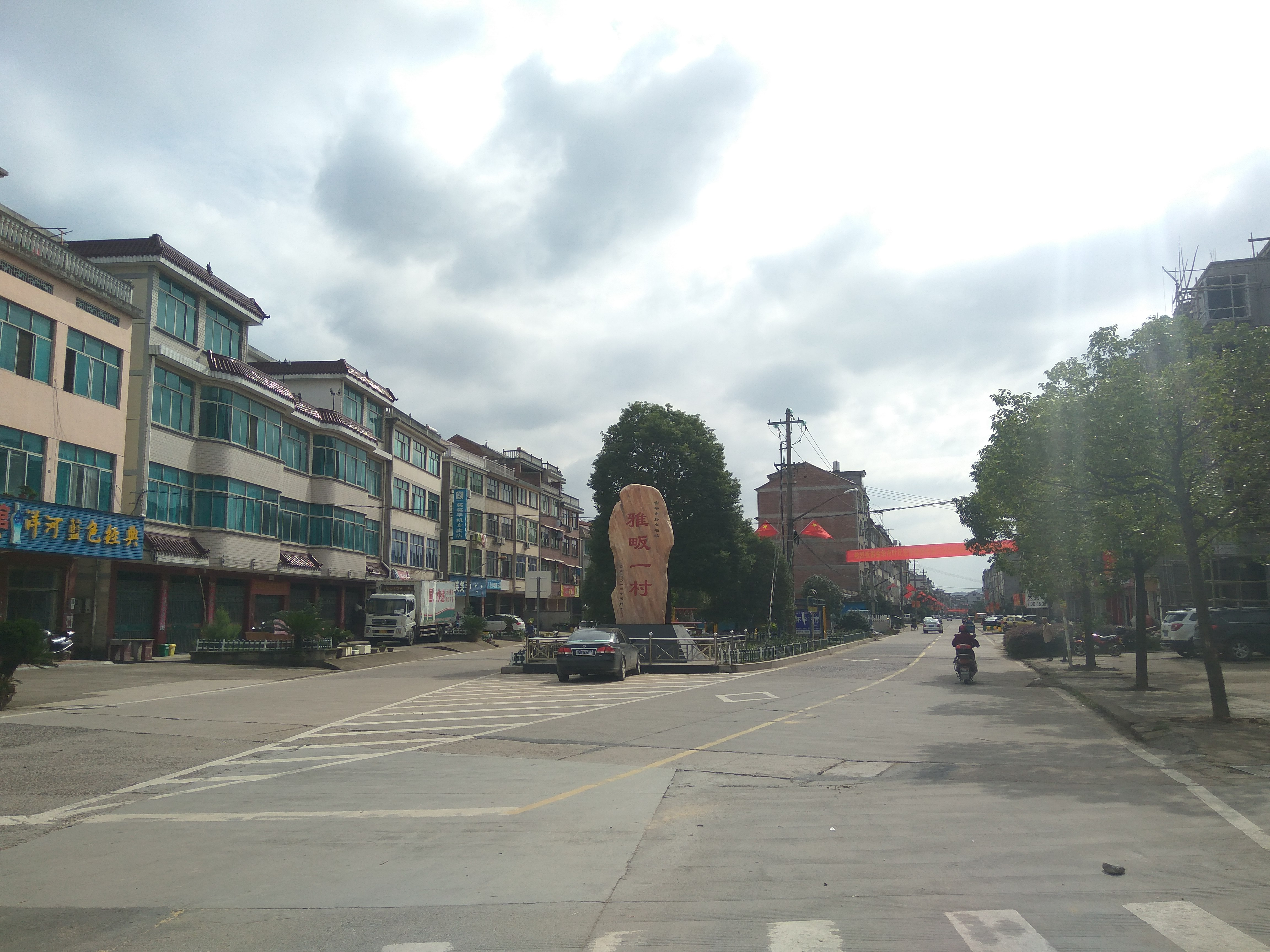 雅畈镇入口